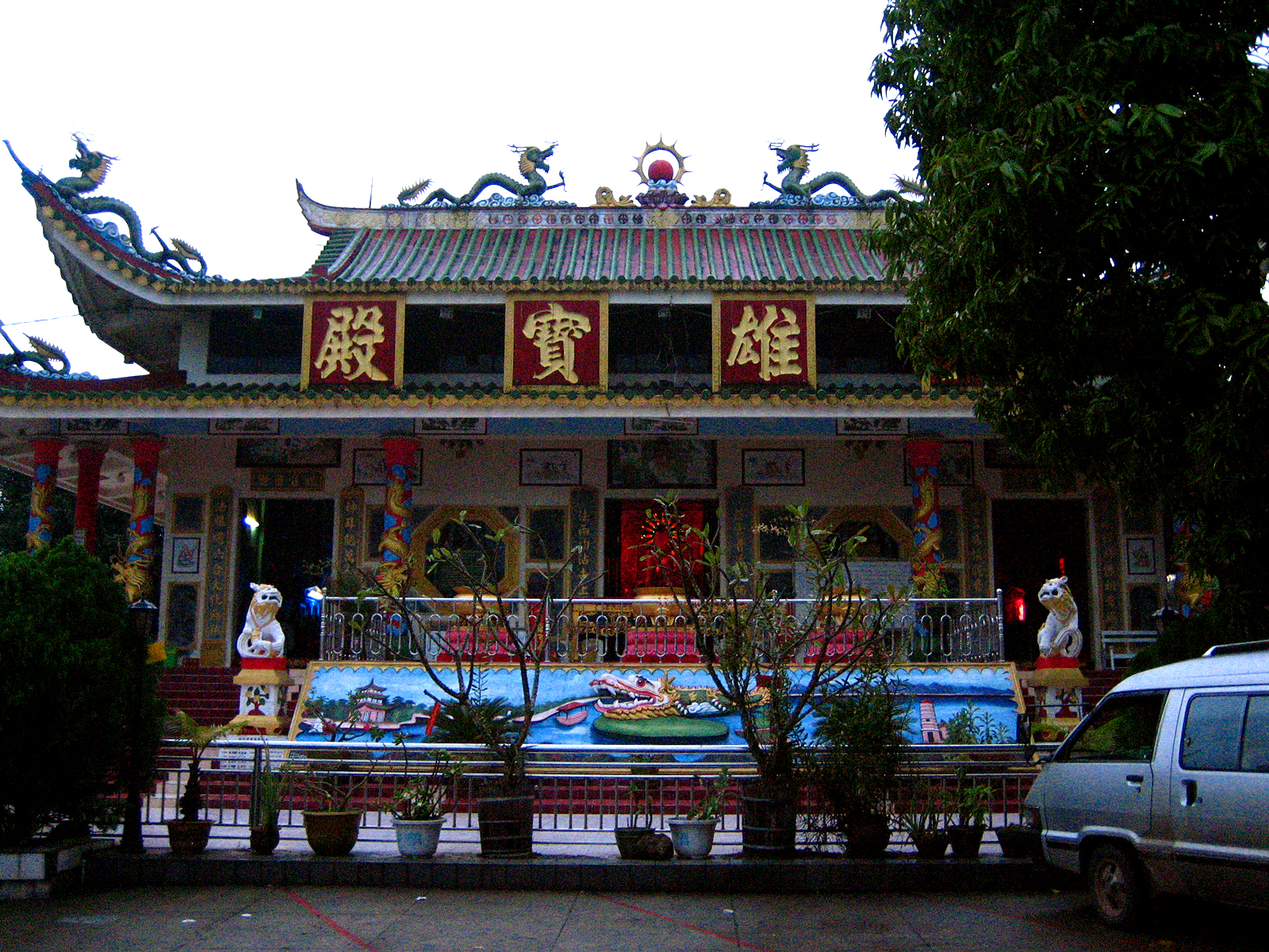 Kwan Yin Si, Bago, Myanmar